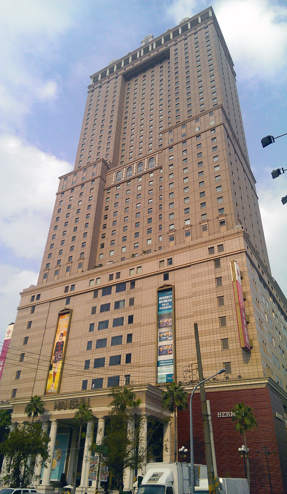 中文（台灣）: 漢來新世界中心